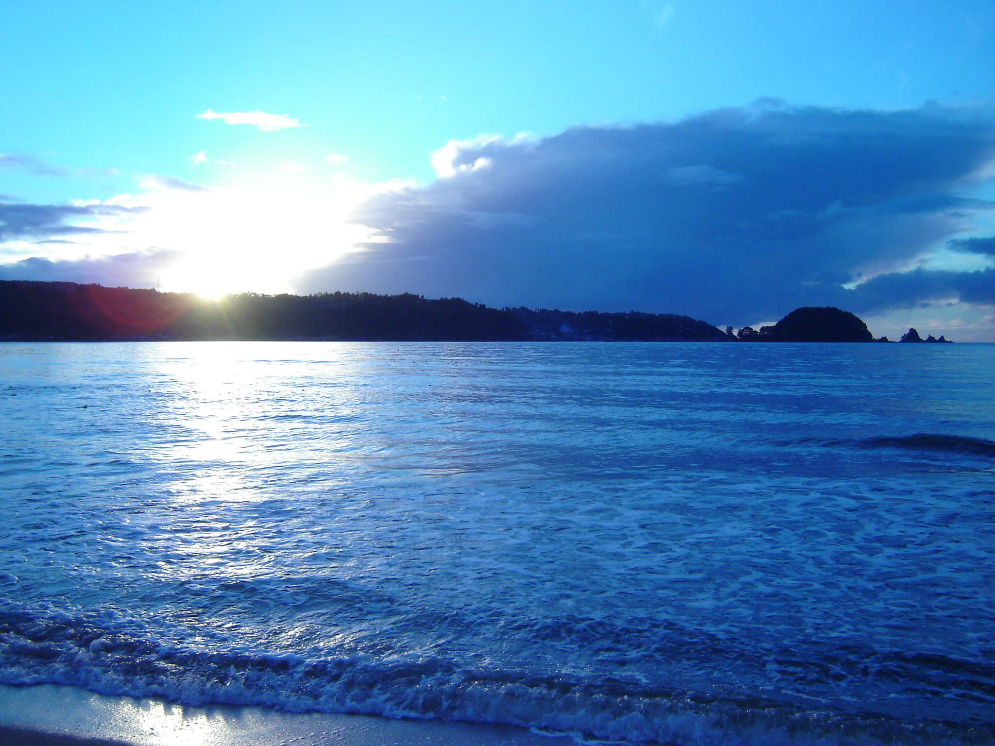 Dichato Beach